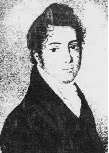 Андрей Сергеевич Кайсаров